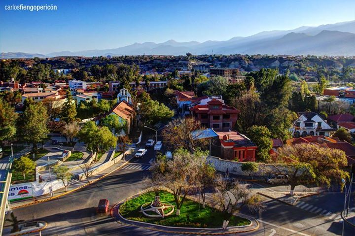 Barrio el Molino